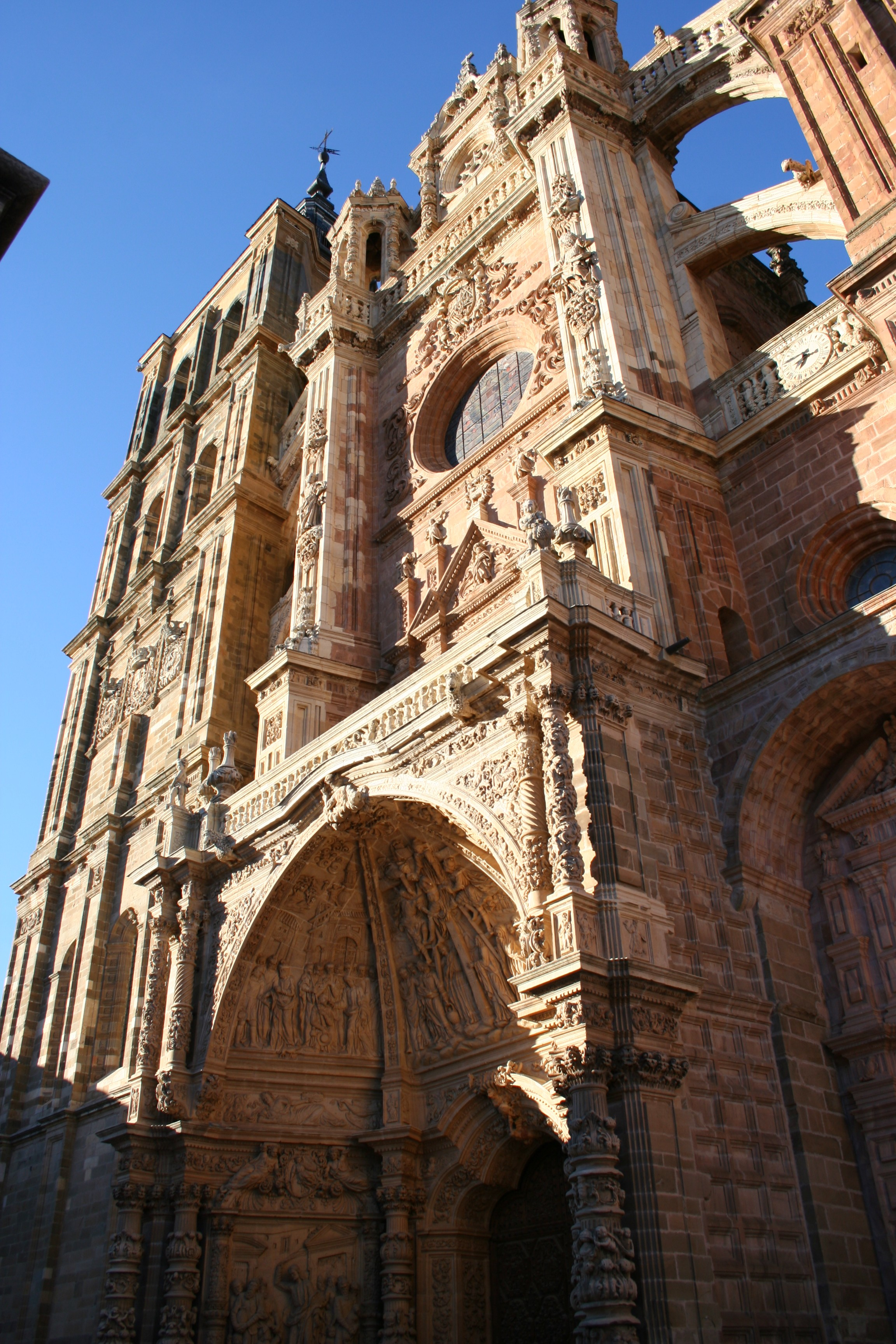 Fachada de la catedral